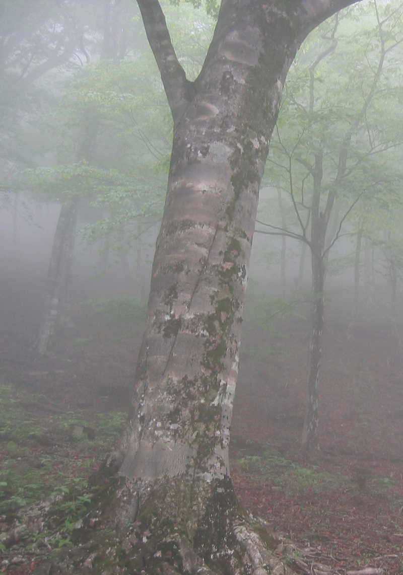 Beech